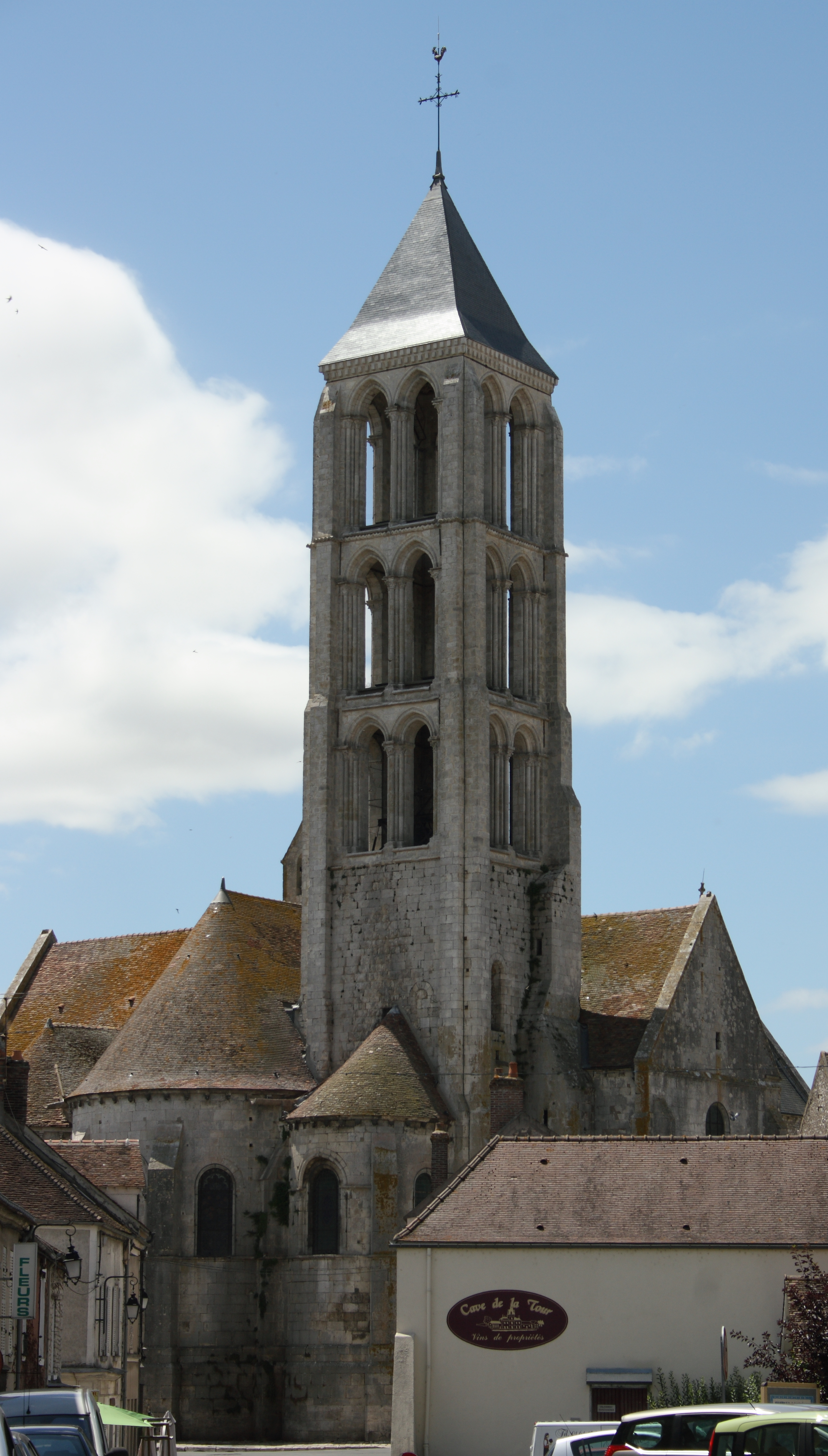 Katholische Kirche Notre-Dame de l'Assomption in Château-Landon, einer Gemeinde im Département Seine-et-Marne (Île-de-France), Glockenturm und Chorhaupt